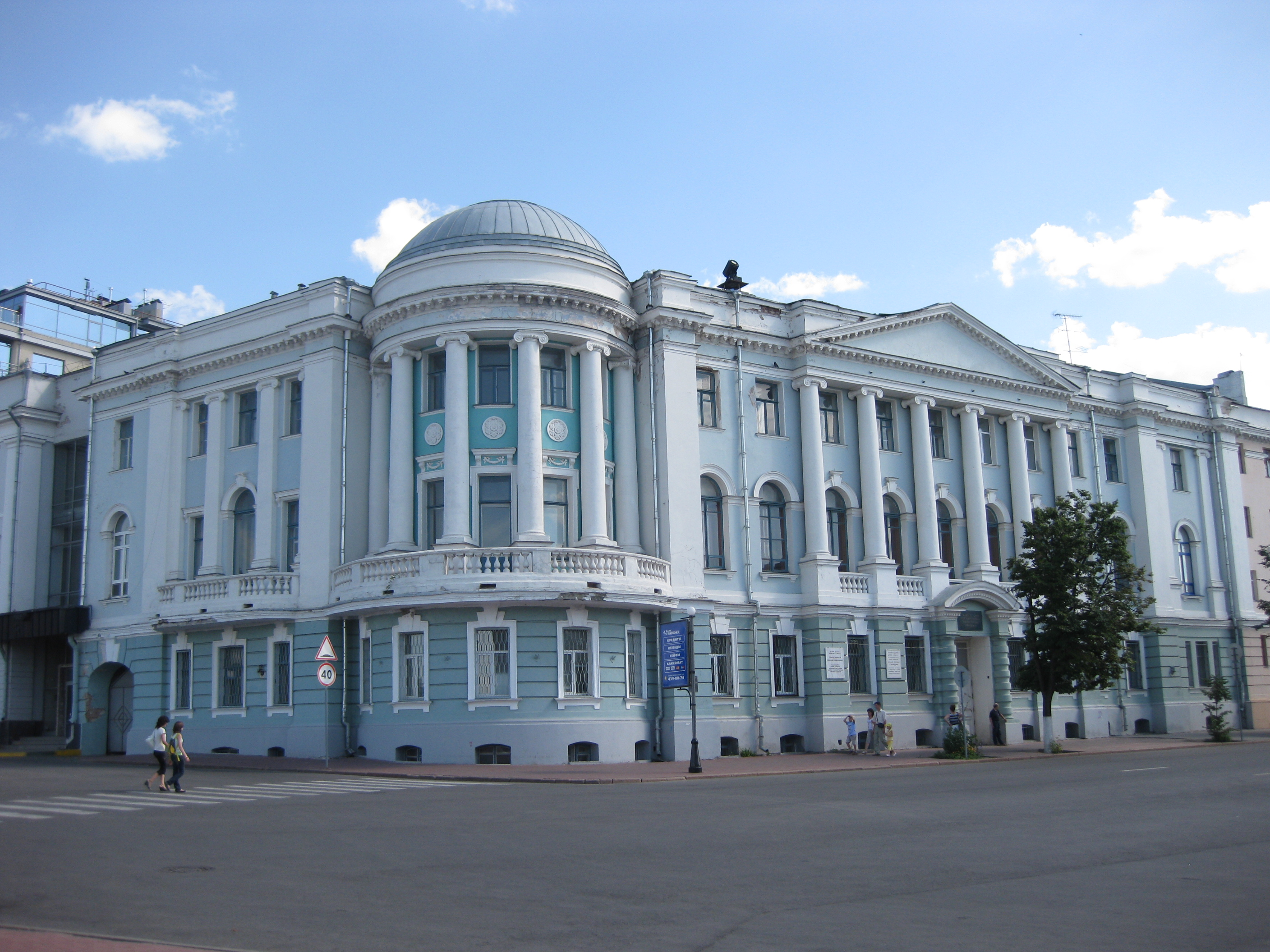 1-й корпус Нижегородской государственной медицинской академии.